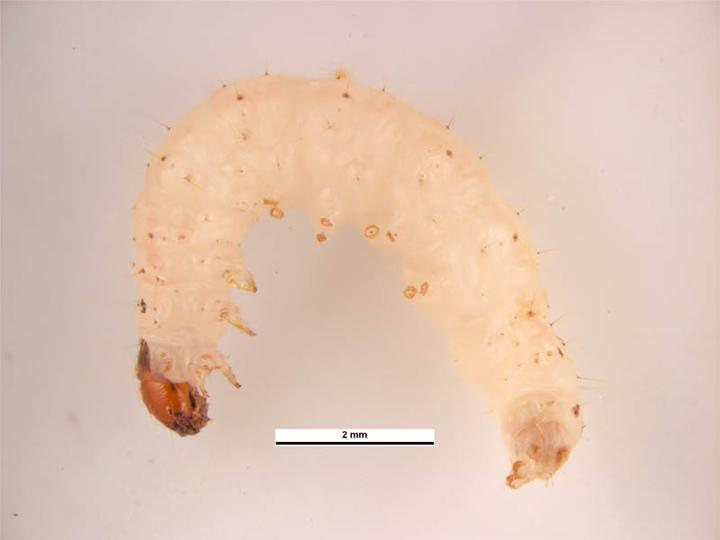 Ephestia kuehniella caterpillar